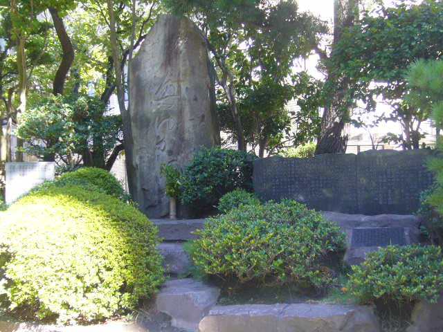 横山正治慰霊碑「海ゆかば」